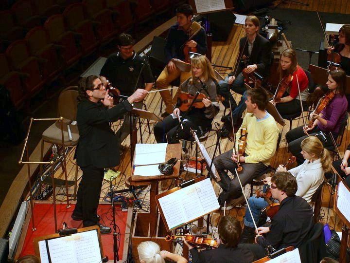 Rudolfinum, Marios Christou (diriguje Missa Graeca)